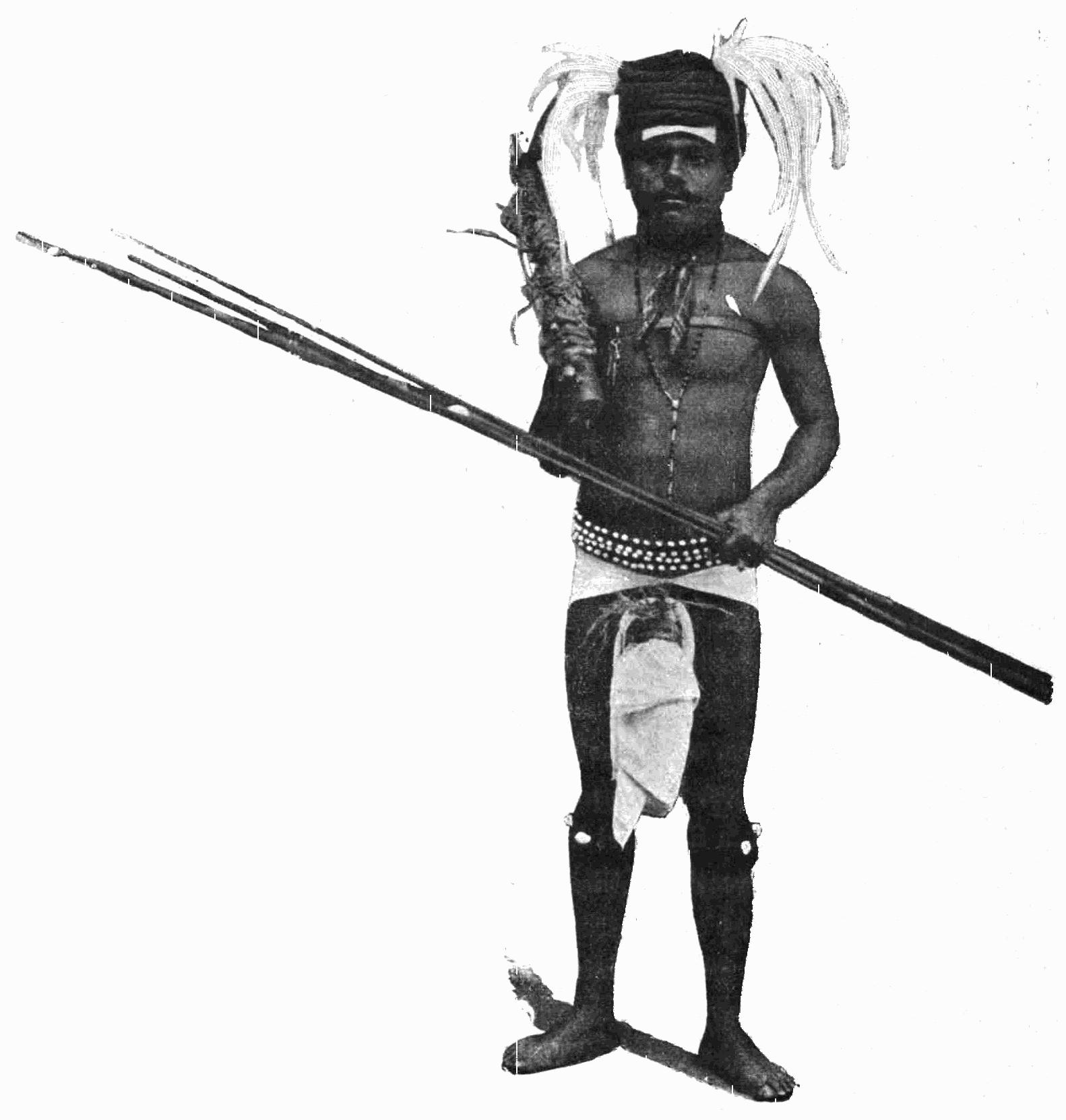 canaque de la nouvelle-calédonie en costume de fête